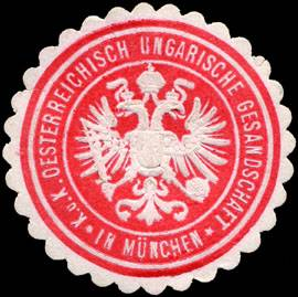 Sealing stamp Title: Kaiserlich und Königlich Österreichisch Ungarische Gesandschaft in München Description: rot, weiß, geprägt Place: München size: 3 cm